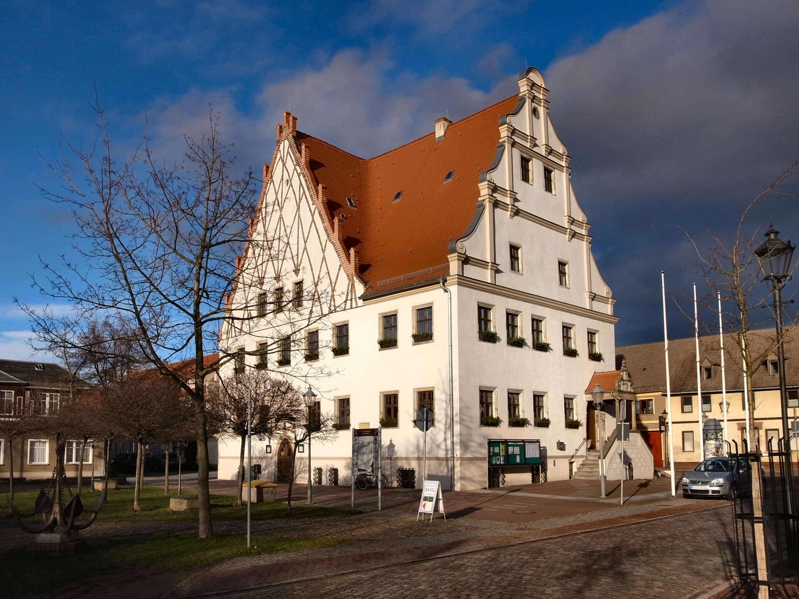 Aken (Elbe),Rathaus